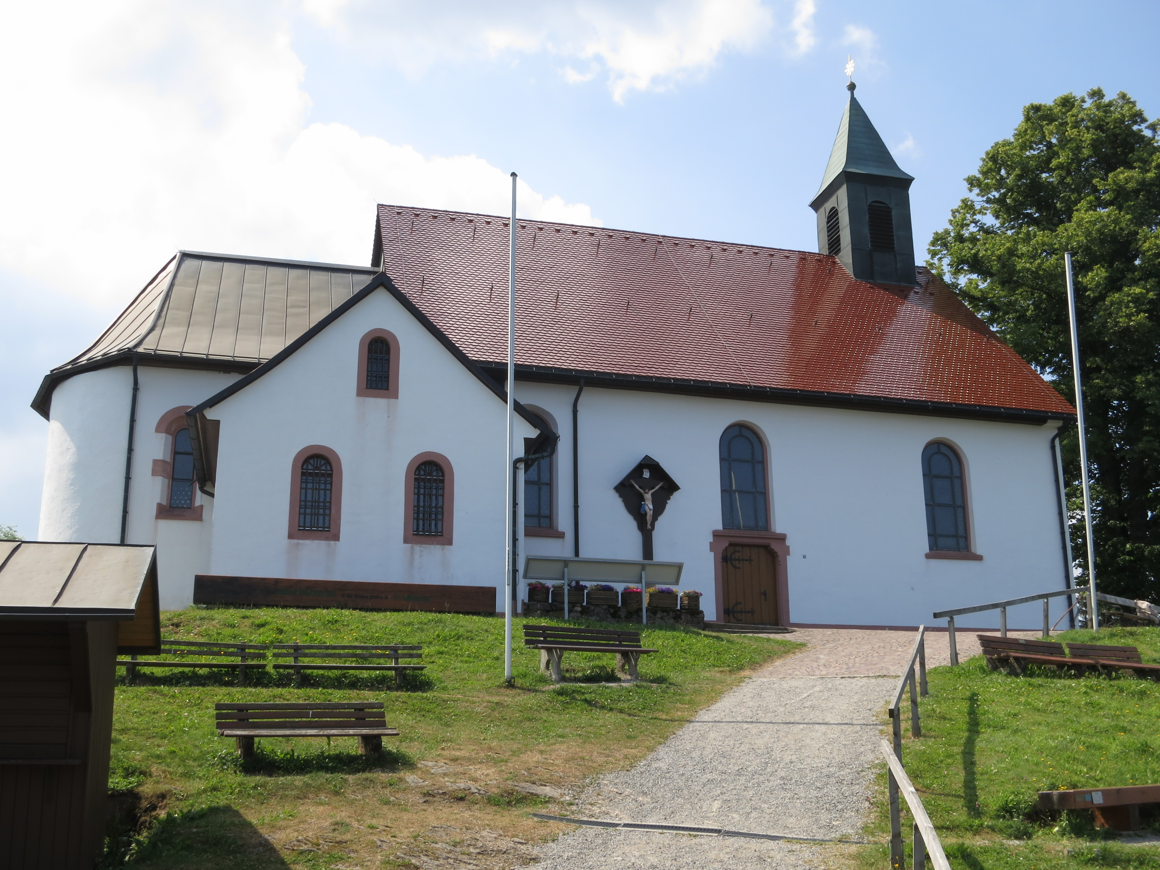 Wallfahrtskirche "Unserer Lieben Frau vom Hörnleberg" bei Winden im Elztal.